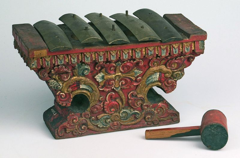 Slaginstrument. Metallofoon met vijf toetsen, onderdeel van gamelan Gong of gamelan Semar Pagulingan Unknown language: Gangsa jongkok